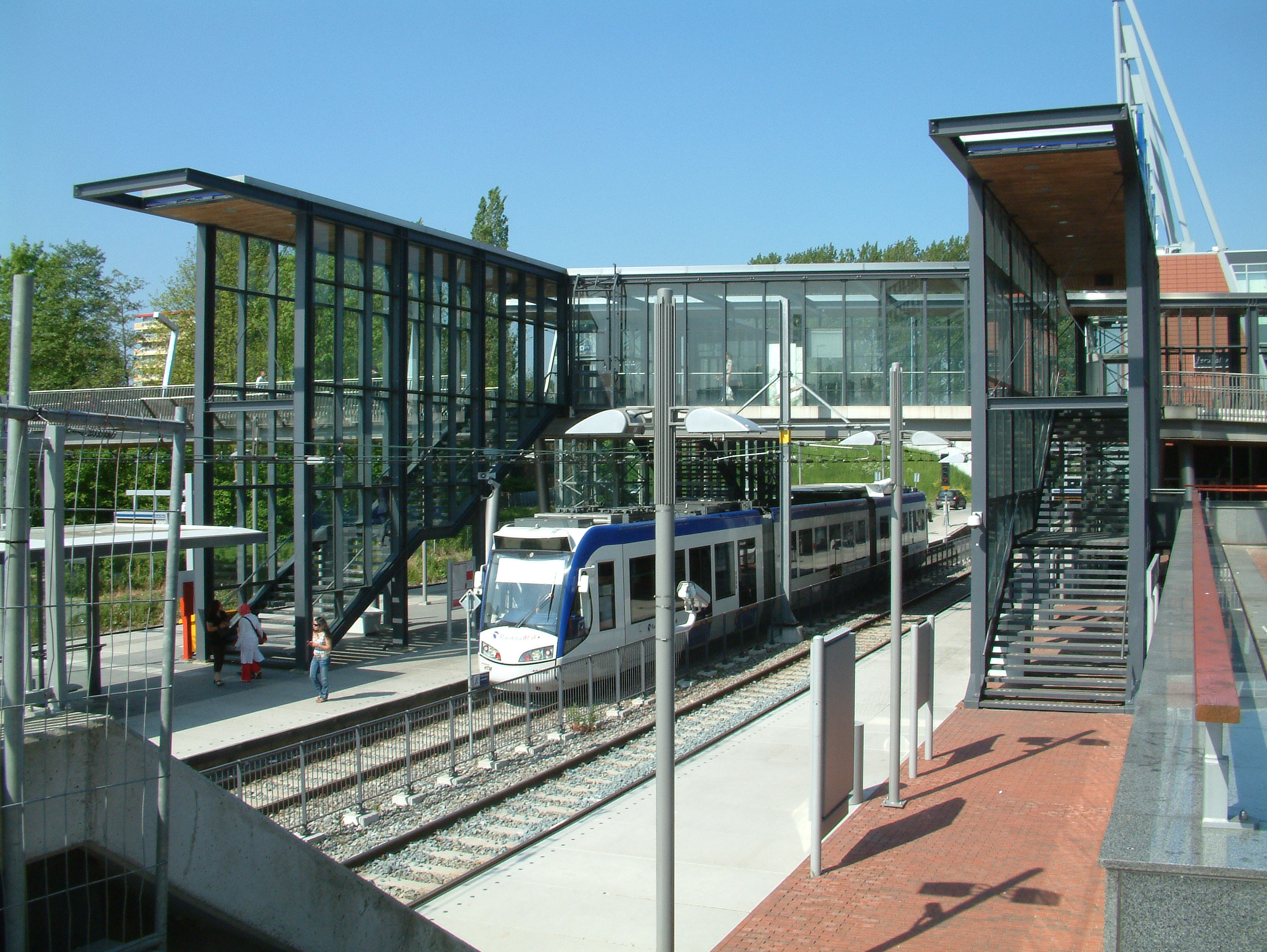 Zoetermeer Stadshart Station Centrum West